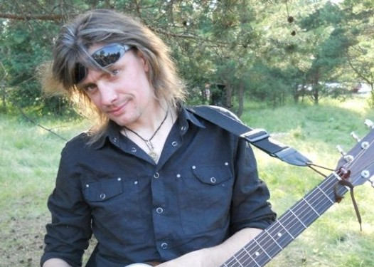 Михаил (Майк) Жигачёв